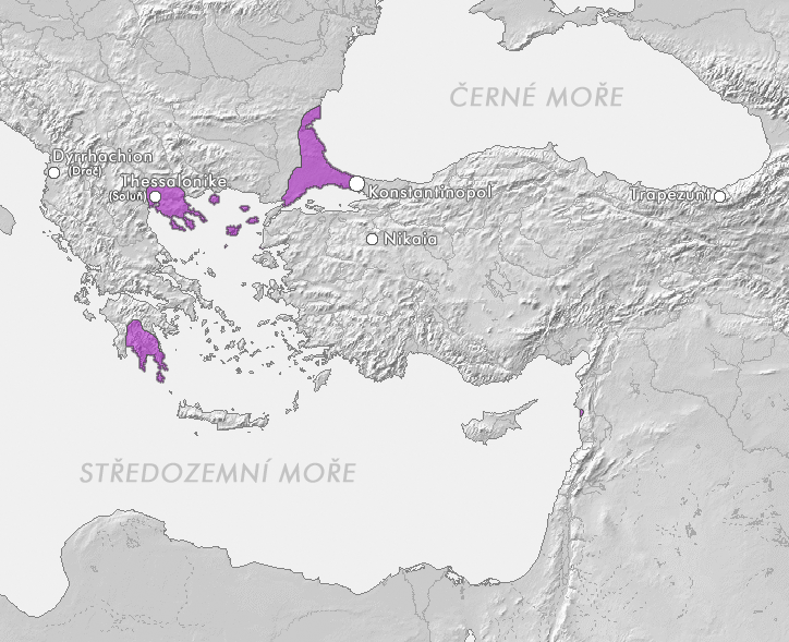 Byzantská říše na sklonku své existence po roku cs:1400.